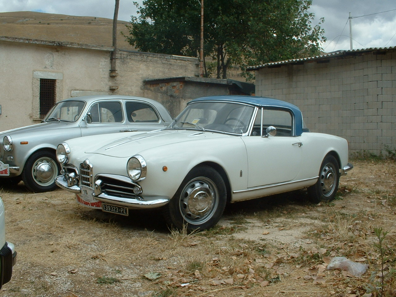 Alfa Romeo Giuletta, 1962